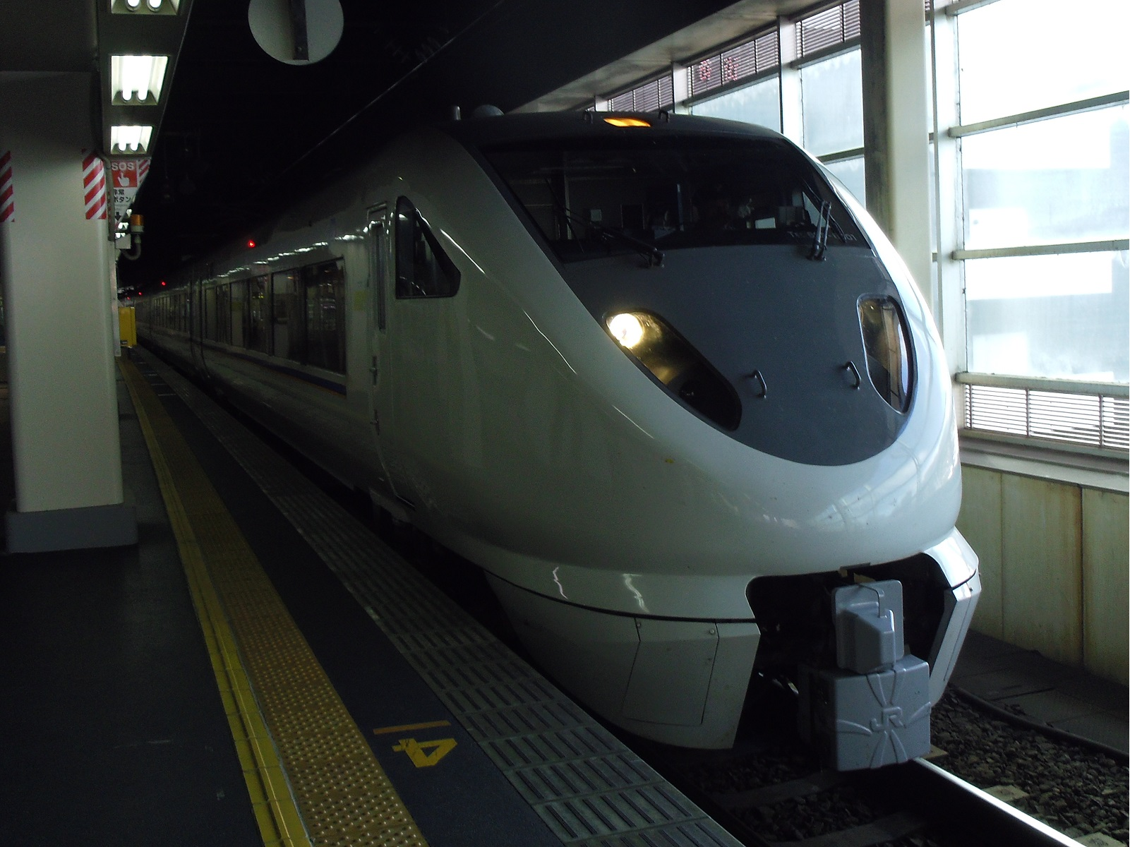 しらさぎ色となったクロ683-8001。写真は「能登かがり火5号」での運用時。